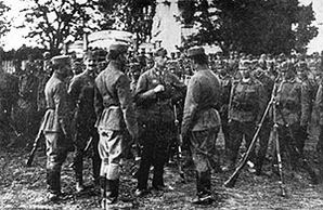 Wilhelm Hapsburg and USR